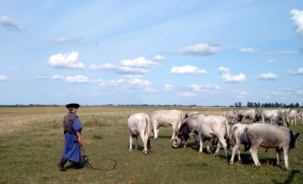 Ungaresch Groranner an der Puszta.